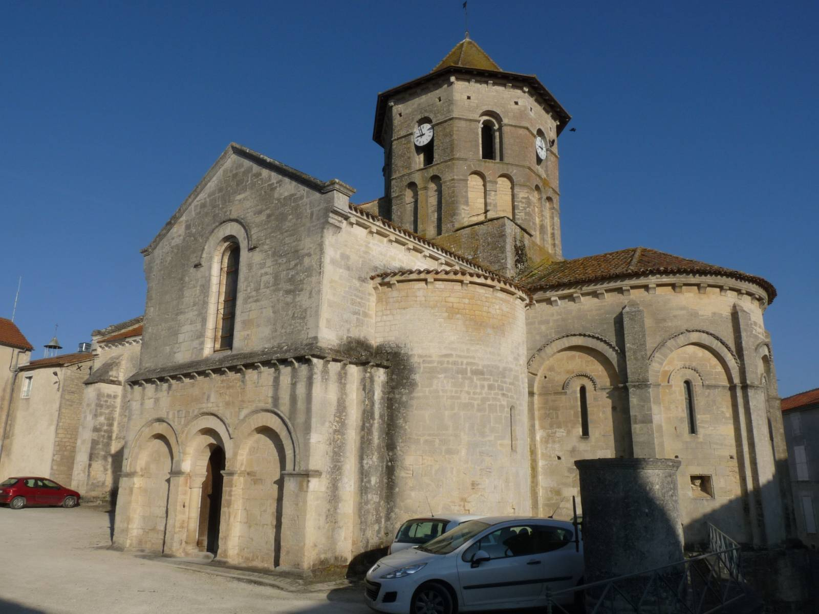 Eglise de Rouillac, Charente, France